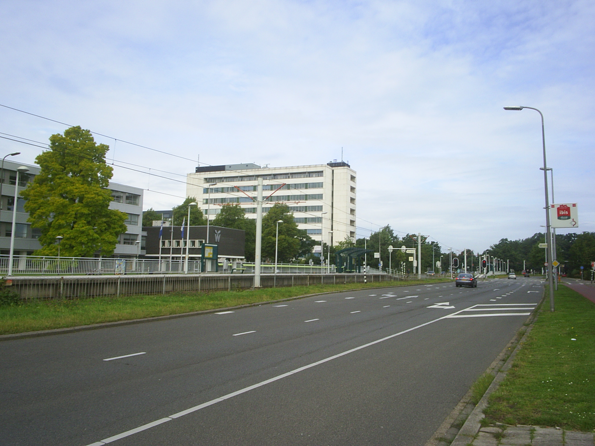 Sneltramhalte 24 oktoberplein Zuid; Ziekenhuis Oudenrijn